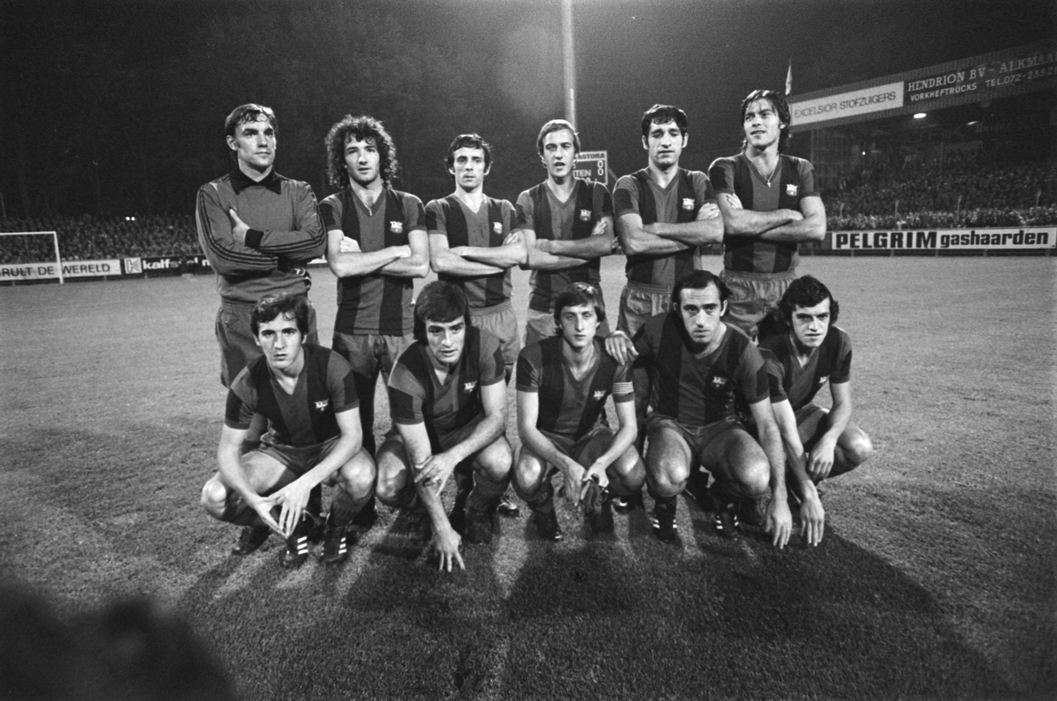 Collectie / Archief : Fotocollectie Anefo Reportage / Serie : [ onbekend ] Beschrijving : AZ67 tegen Barcelona (UEFA-cup) 1-1, elftal Barcelona en Cruijff en Van Hanegem schudden handen Datum : 19 oktober 1977 Locatie : Barcelona Trefwoorden : sport, voetbal Persoonsnaam : Cruijff, Johan Instellingsnaam : FC Barcelona Fotograaf : Suyk, Koen / Anefo Auteursrechthebbende : Nationaal Archief Materiaalsoort : Negatief (zwart/wit) Nummer archiefinventaris : bekijk toegang 2.24.01.05 Bestanddeelnummer : 929-3987